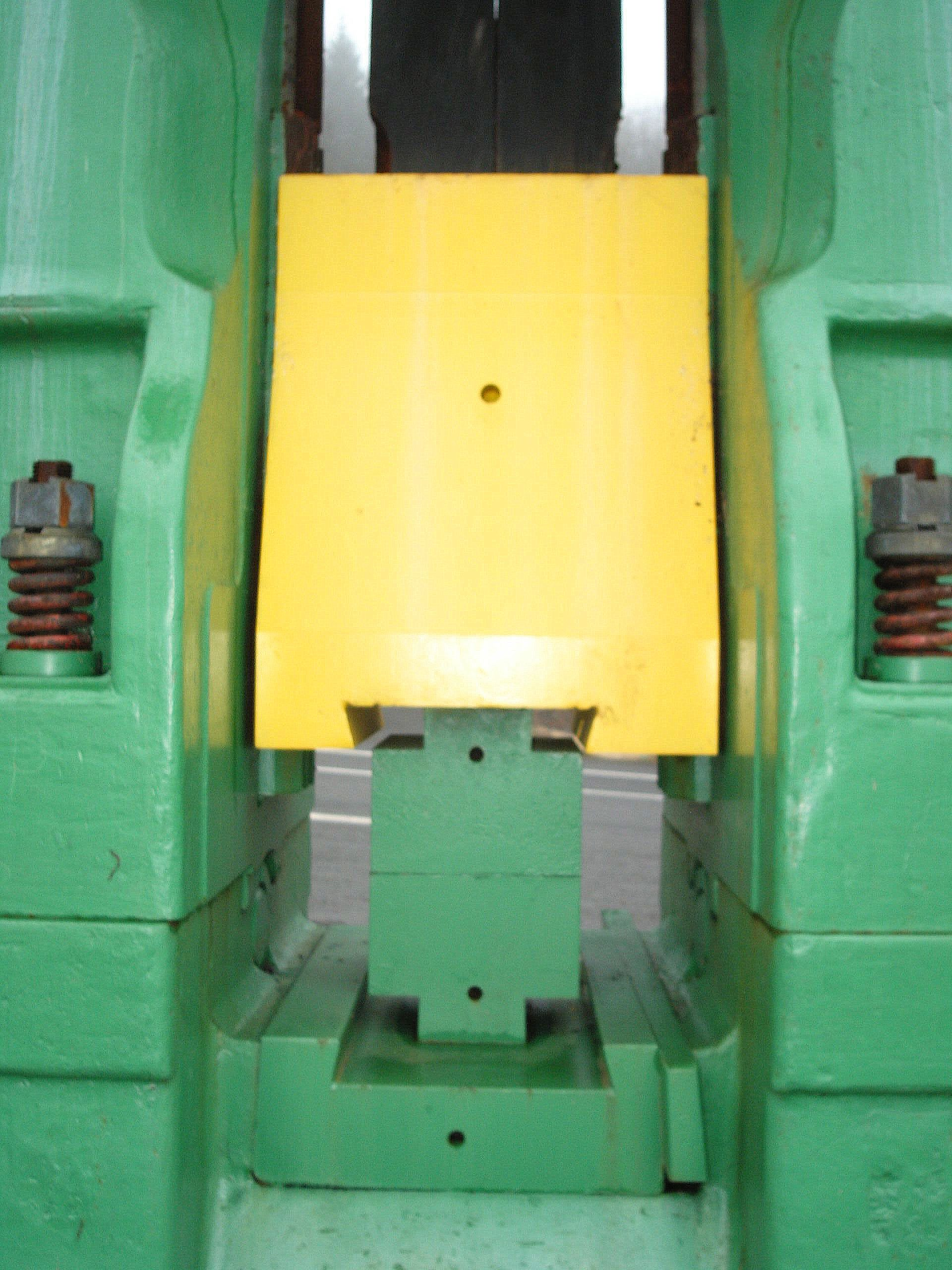 Brettfallhammer Gesenke